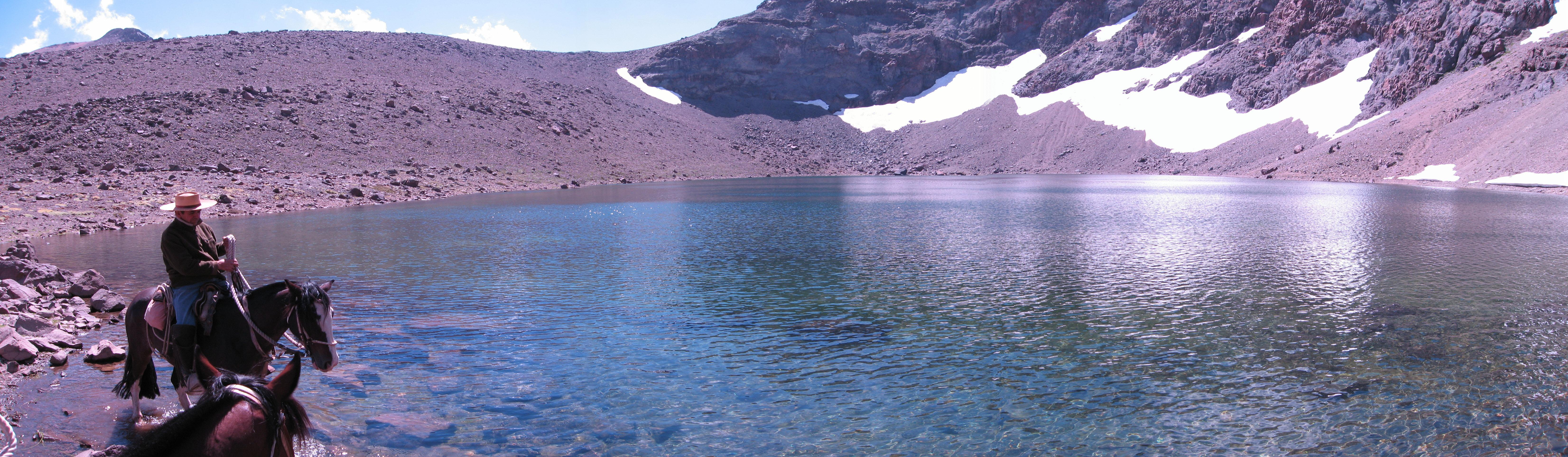 Laguna del Viento cerca de Lo Barnechea Chile